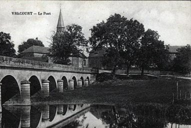 Vrécourt (Vosges - France) : le pont